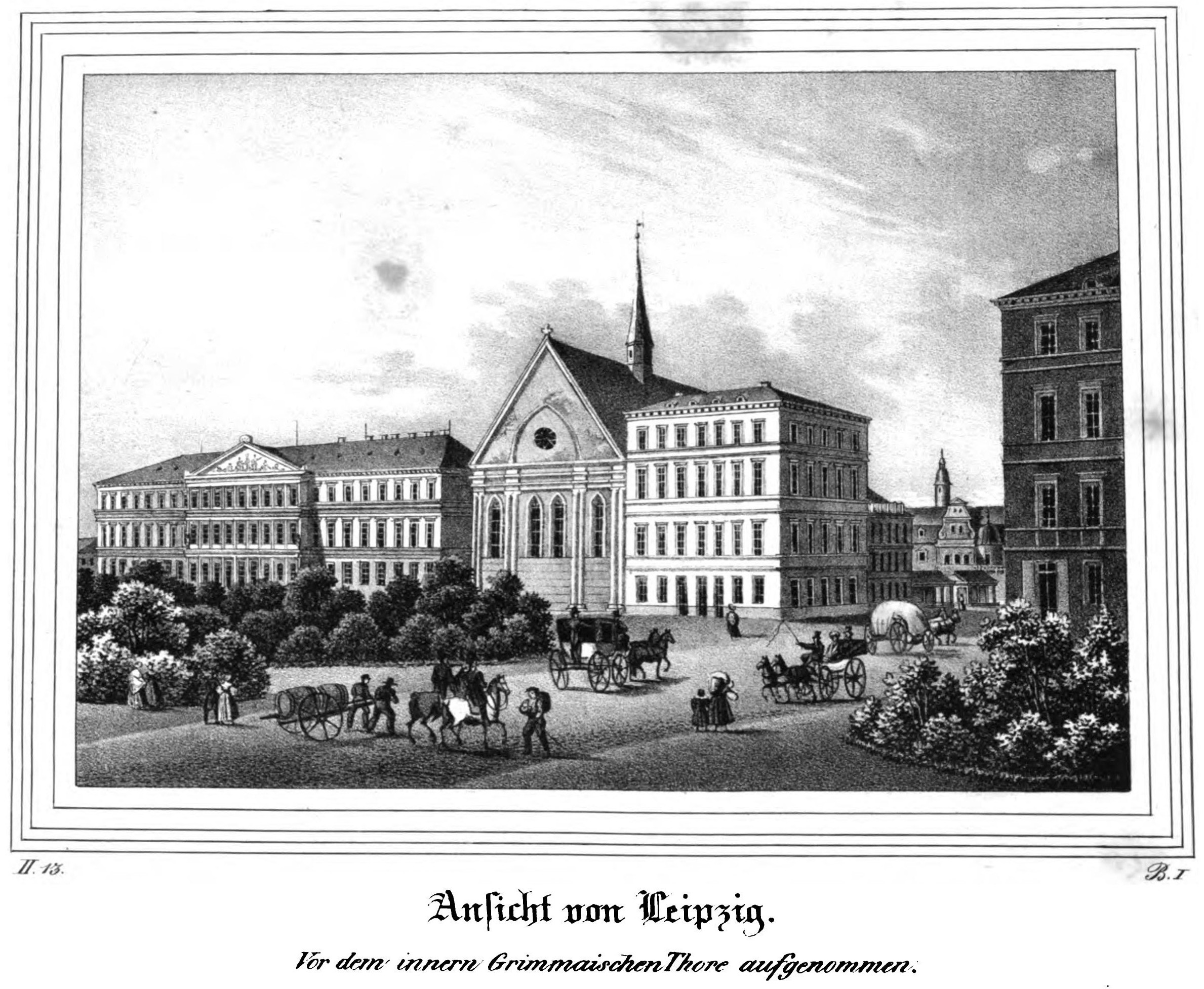 Saxonia Museum für saechsische Vaterlandskunde. Band 2. Dresden: Pietzsch und Comp. Siehe File:Saxonia Museum für saechsische Vaterlandskunde II.djvu